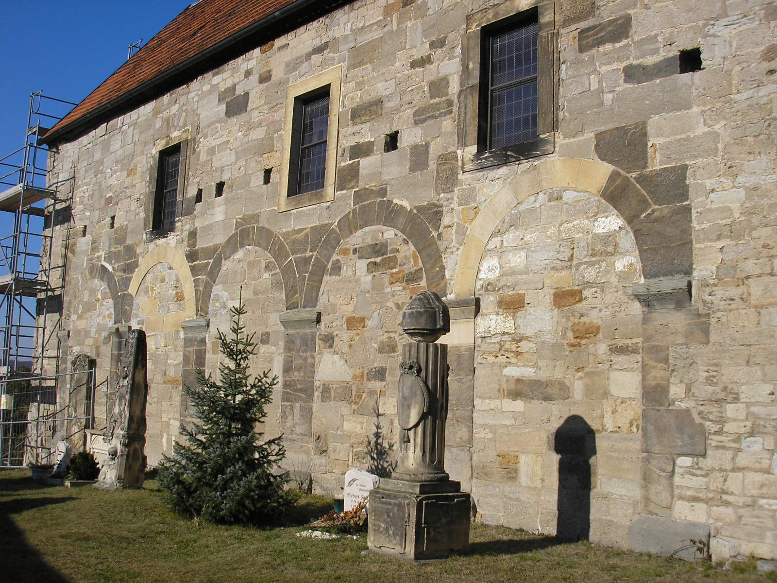 Dorfkirche Oberndorf (Thüringen)